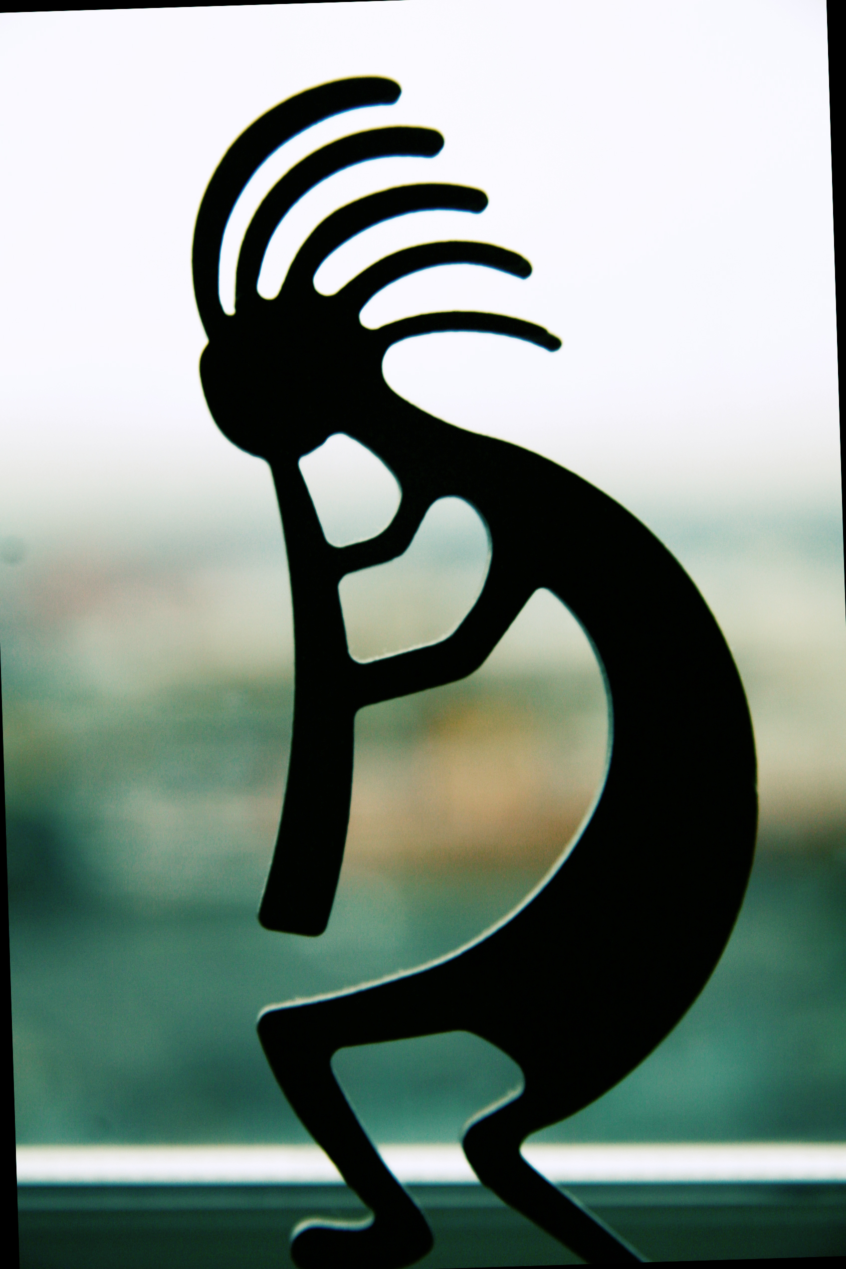 Imagen de Kokopelli